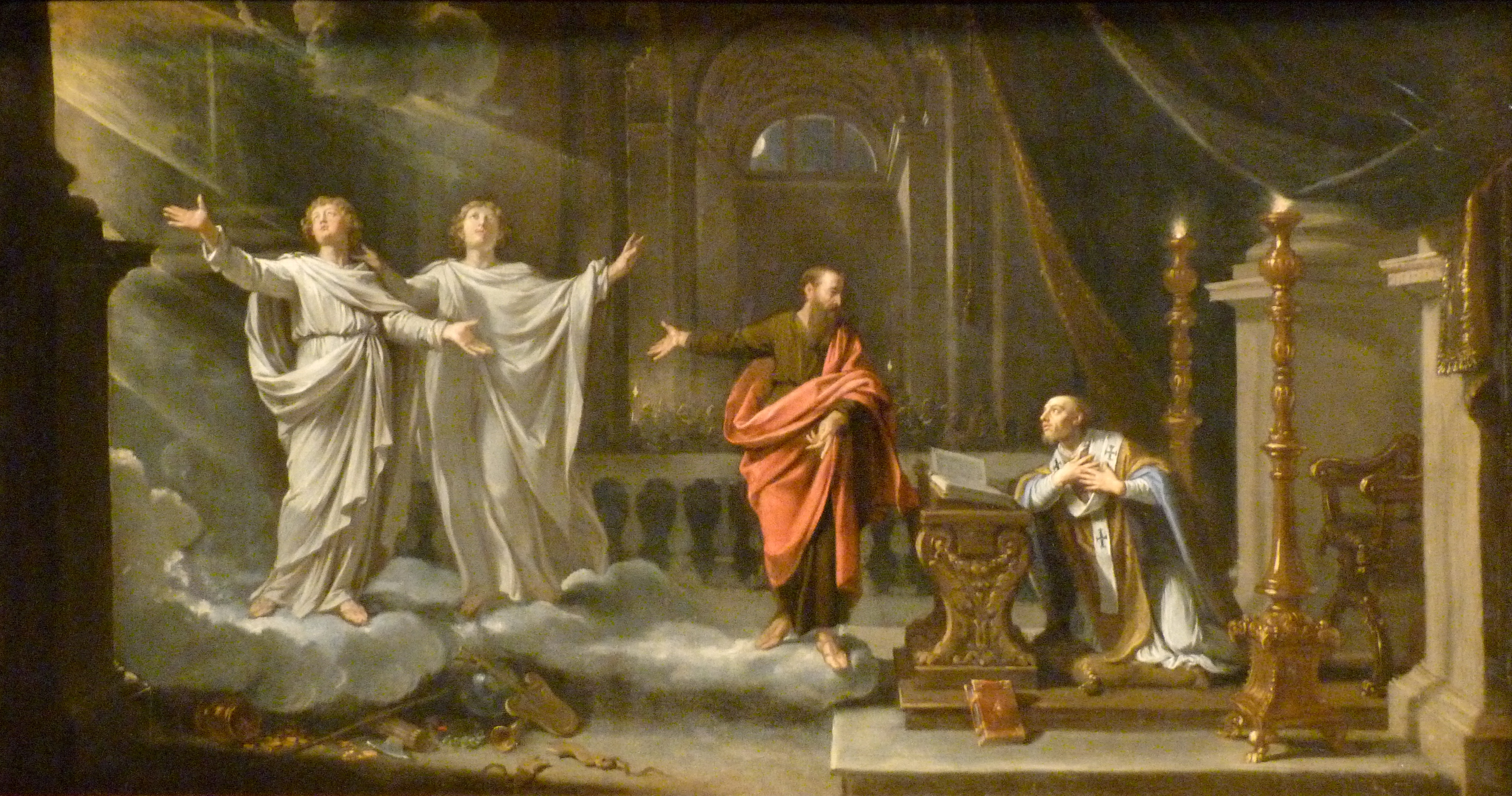 Saint Gervais et saint Protais apparaissant à saint Ambroisetitle QS:P1476,fr:"Saint Gervais et saint Protais apparaissant à saint Ambroise" label QS:Lfr,"Saint Gervais et saint Protais apparaissant à saint Ambroise"